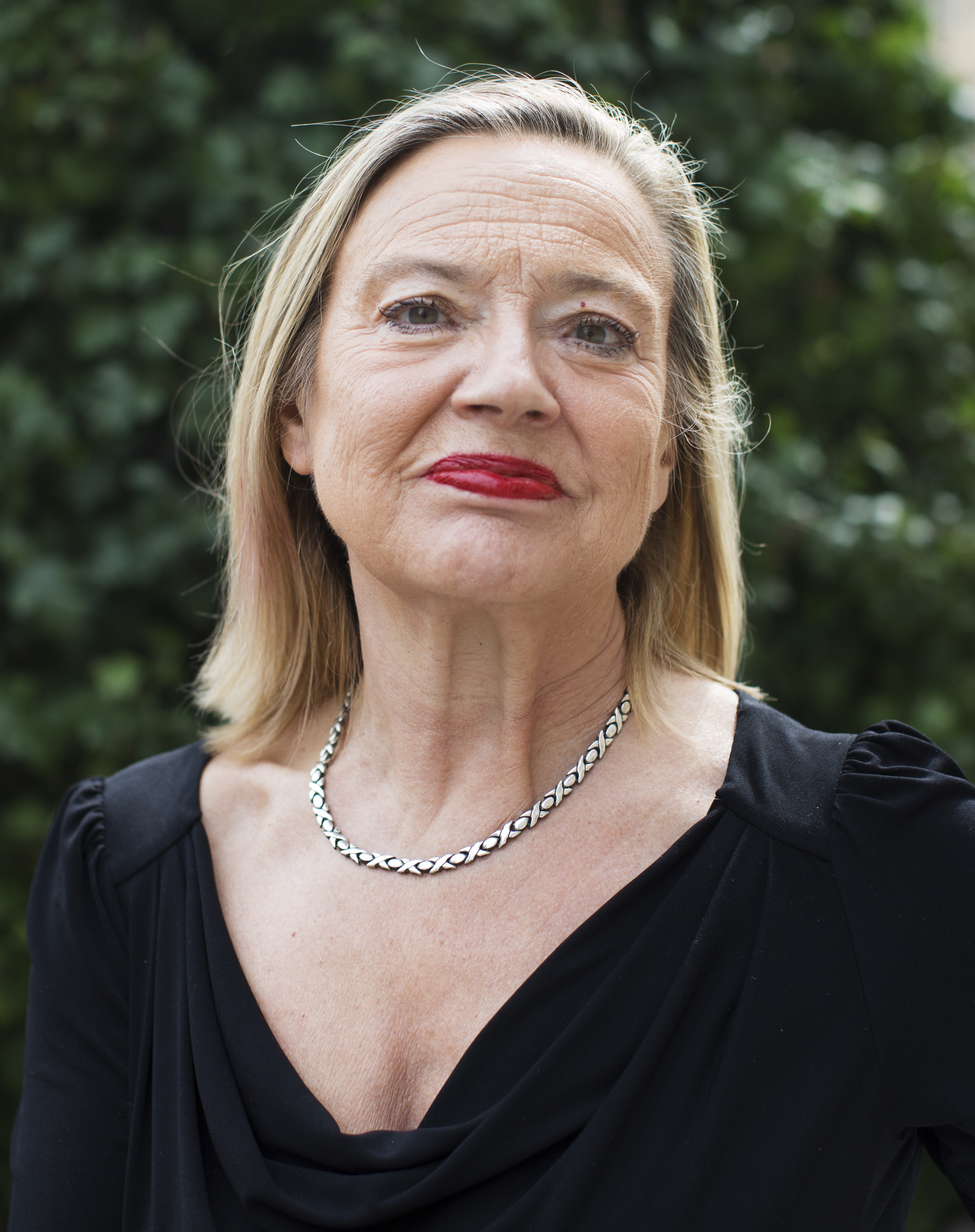 Karin Rågsjö. Vänsterpartiet. 2018.